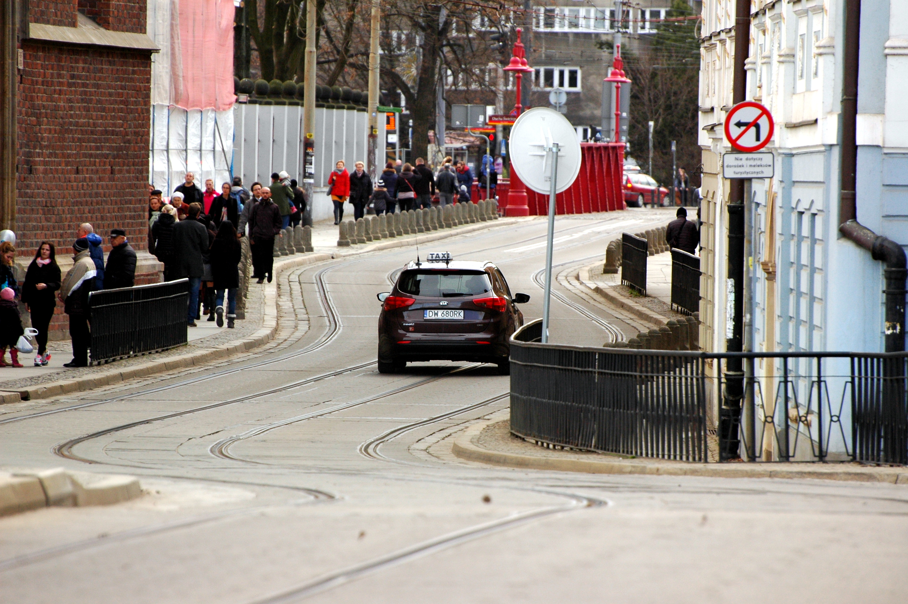 Wrocław w 2015 roku